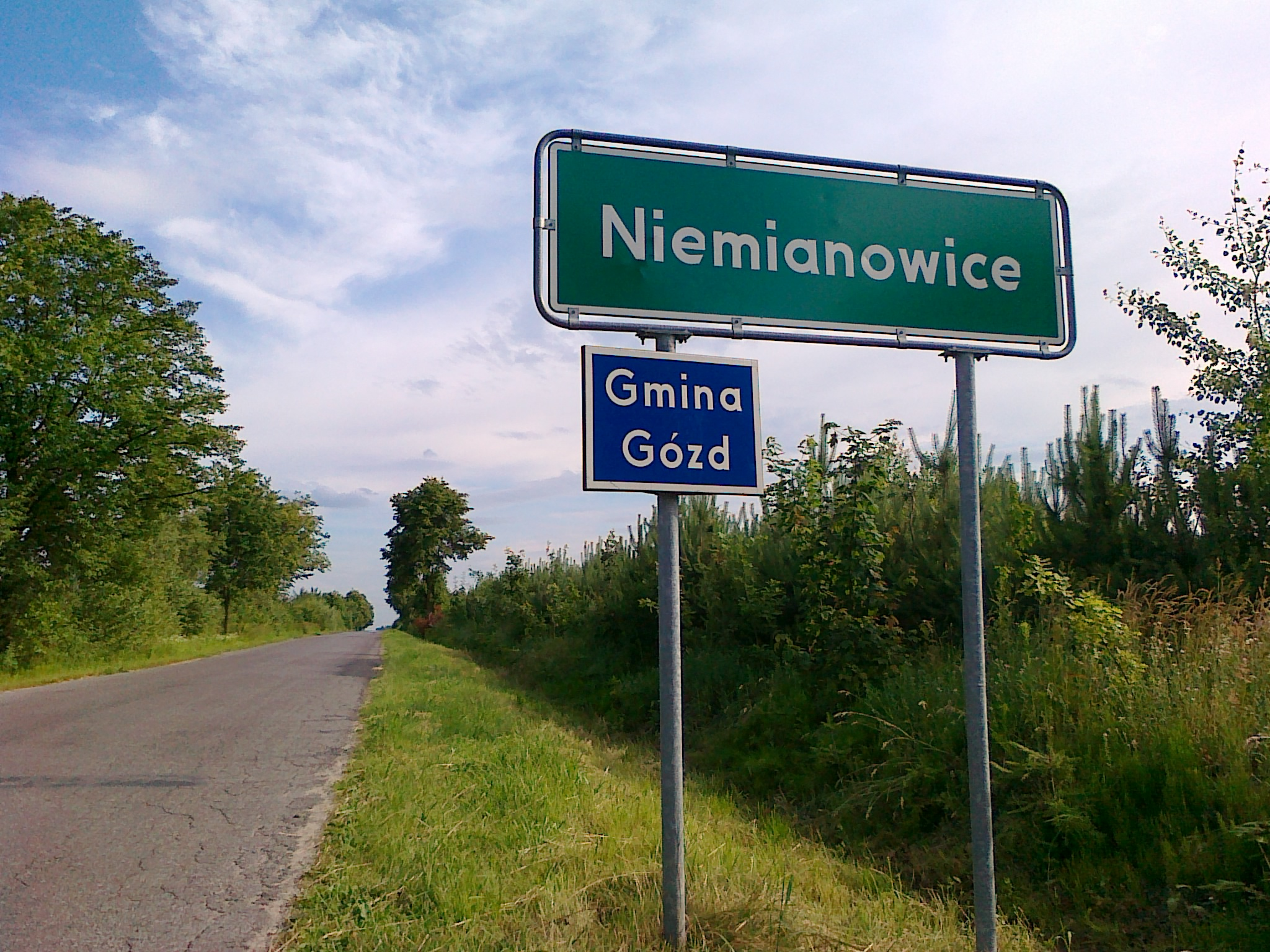 Drogowskaz pomiędzy Gzowicami a Niemianowicami na drodze nr 699. Jest to również granica gminna pomiędzy Jedlnią Letnisko a Gozdem